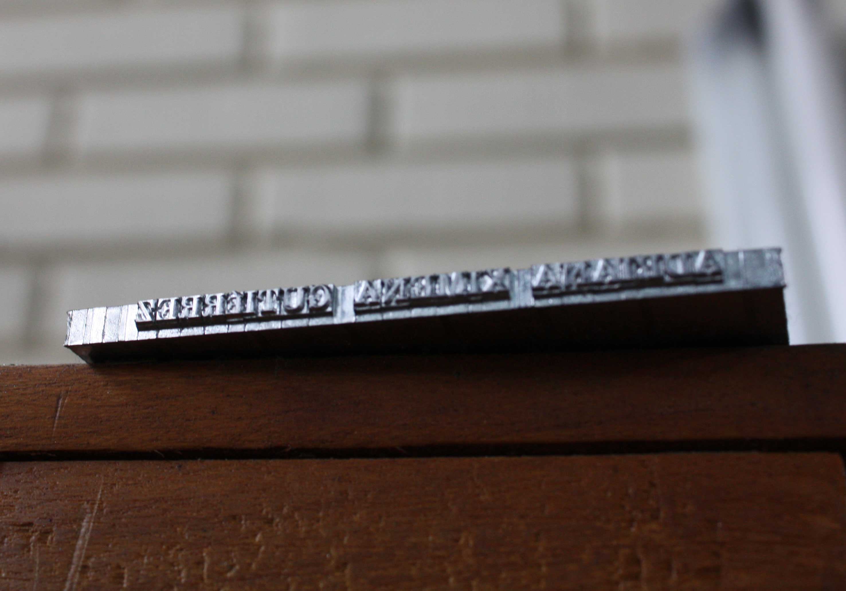 Linea terminada